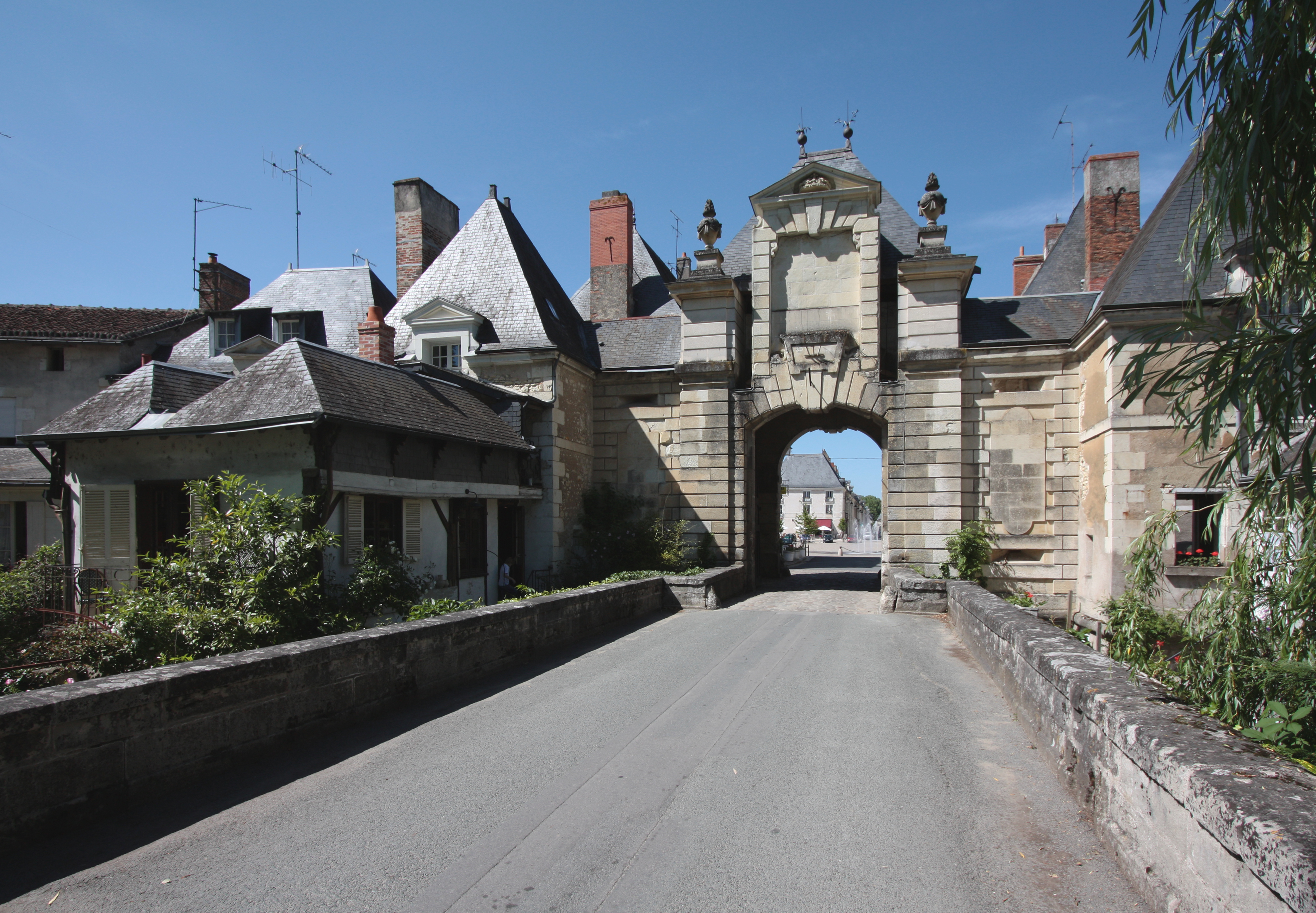 Richelieu, Stadt im Département Indre-et-Loire/Frankreich - südliches Stadttor mit Anbauten.